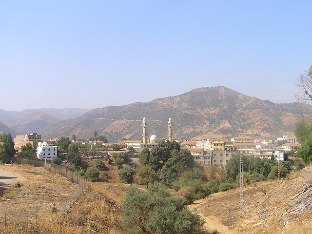 Vue de Lakhdaria-Palestro : l'ancienne mosquée à gauche, la nouvelle au centre avec ses deux minarets.